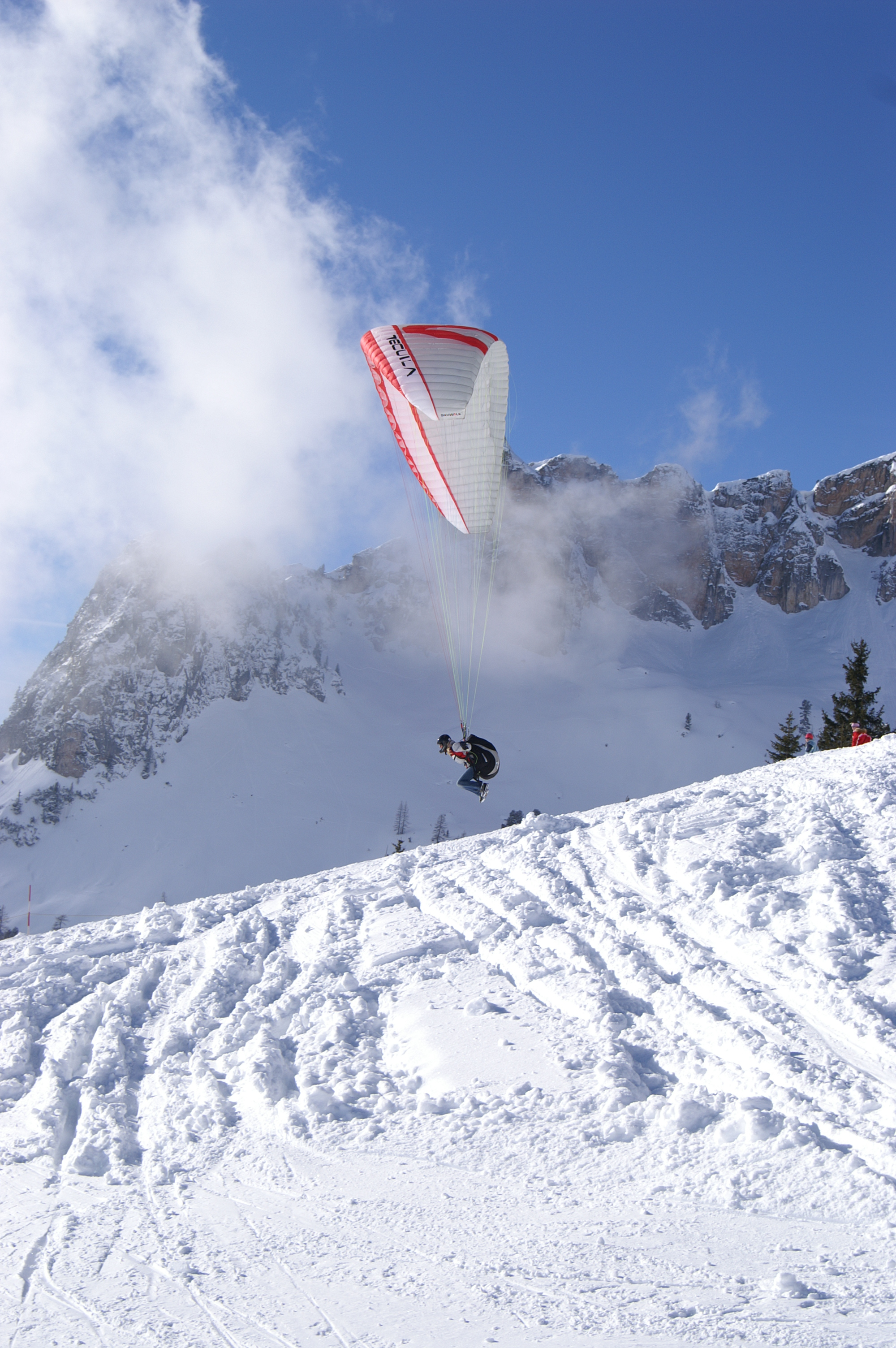 Paragliding auf der Rofan in Maurach am Achensee in Tirol, Im Hintergrund die Dalfazer Wände des Rofangebirges.